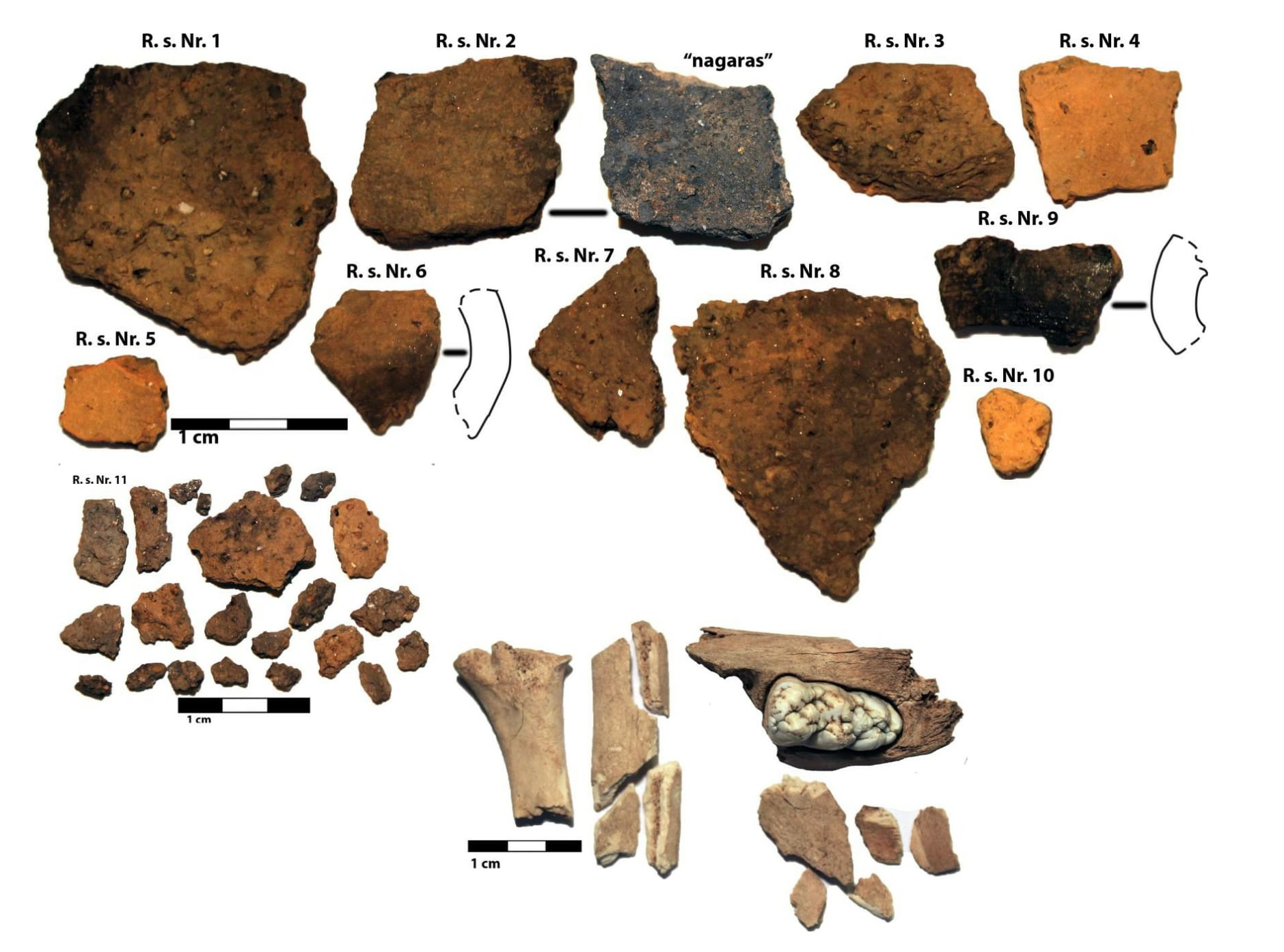 Priešistorinių laikų keramikos iš Gyvakarų kapinyno fragmentai.